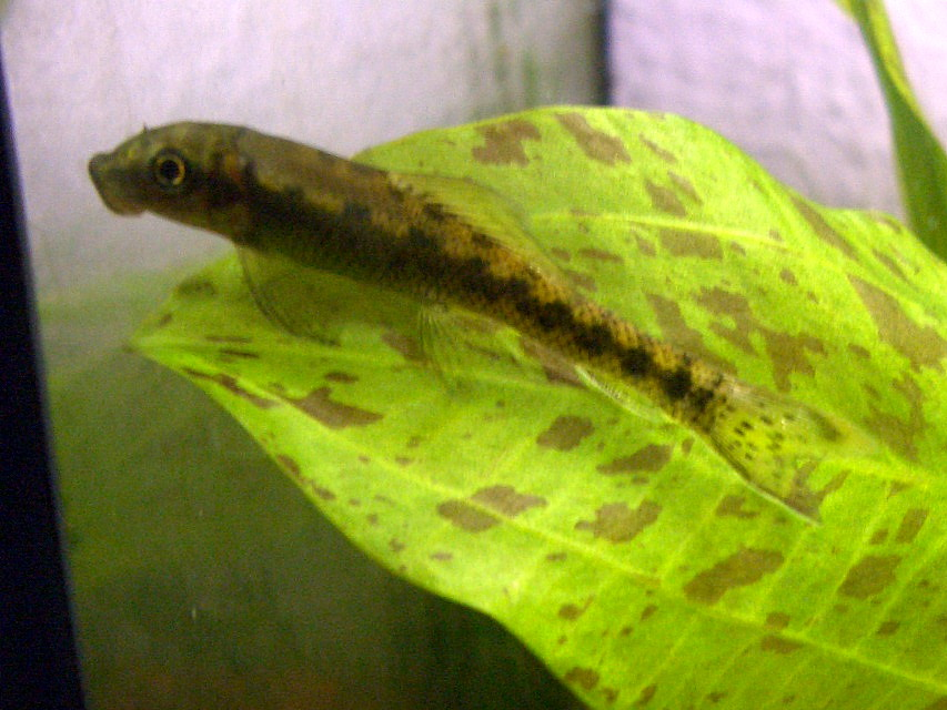 Gyrinocheilus aymonieri Foto einer Saugschmerle. Das Foto habe ich selbst gemacht, es darf für beliebige -explizit auch kommerzielle Zwecke- verwendet werden. GnuShi